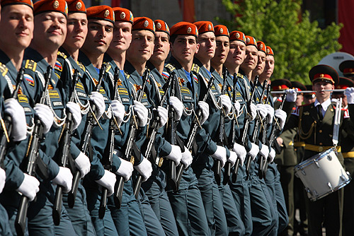 Москва. Красная площадь. Военный парад в честь 64-й годовщины Победы в Великой Отечественной войне.